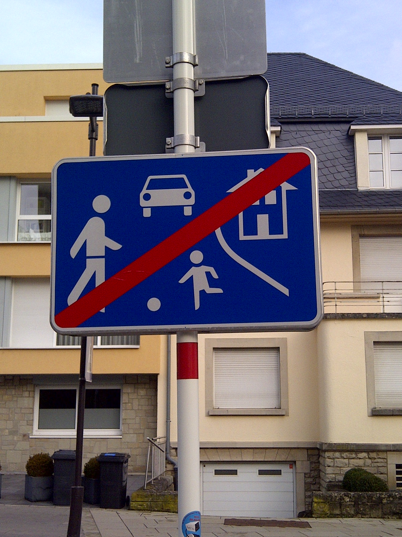 Verkéiersschëd E, 25b "Fin de zone résidentielle" aus dem Lëtzebuerger Code de la route.